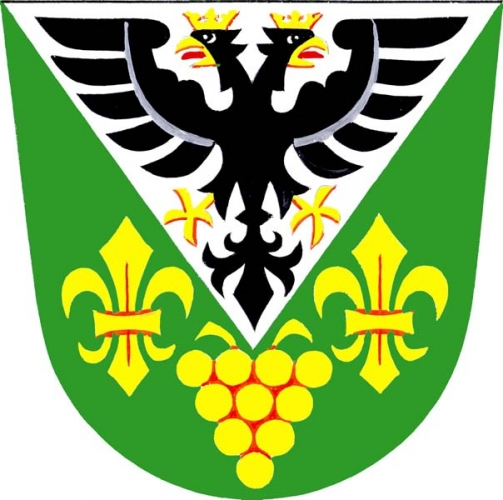 znak, Lechovice, okres Znojmo